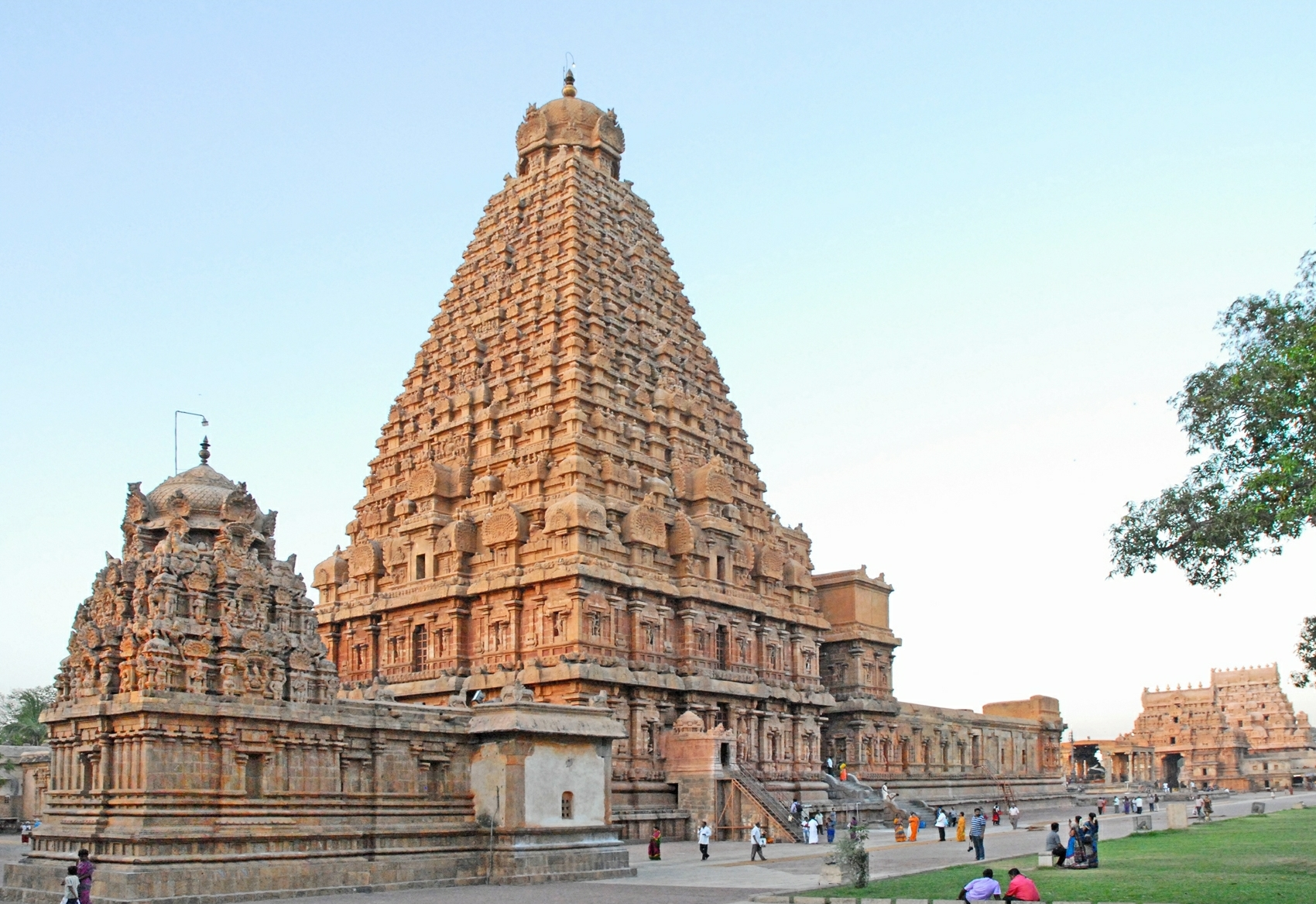 Le Vimana, haut de 70m, est de base carrée (c'est le symbole de la demeure des dieux : Mont Meru ou Kailash), il surmonte le sanctuaire de deux étages qui abrite un énorme Lingam. A doite, deux salles à piliers (mandapa) destinées aux fidèles Le temple et ses dépendances occupent une surface de 241m par 121m. Les bâtiments sont entourés de murs coiffés de taureaux Nandi, la monture de Shiva. Comme dans tous les temples, on y entre par l'est en passant sous deux grands gopuram(s). L'intérieur du sanctuaire, toujours en activité, n'est qu'accessible aux hindous. Le plan de ce temple s'inspire de la tradition Pallava (le temple du rivage de Mahabalipuram) Les grands temples vivants de la dynastie des Chola, classés sur la liste du patrimoine mondial de l'UNESCO, datent des XIe et XIIe siècles, ce sont : le temple de Brihadisvara de Thanjavur, le temple de Brihadisvara de Gangaikondacholisvaram et le temple d’Airavatesvara (Airavateshwara) de Darasuram. Ils sont situés dans l'Etat du Tamil Nadu en Inde du sud. Ces temples, caractéristiques de l'art dravidien médiéval tardif, témoignent des brillantes réalisations de l’ère Chola en architecture, peinture, sculpture et statuaire en bronze. Le temple de Brihadishwara et la cité religieuse qui l'entoure ont été construits sous le règne de Rajaraja Ier (985-1014) qui a fondé l'empire Chola. Le site de l'UNESCO